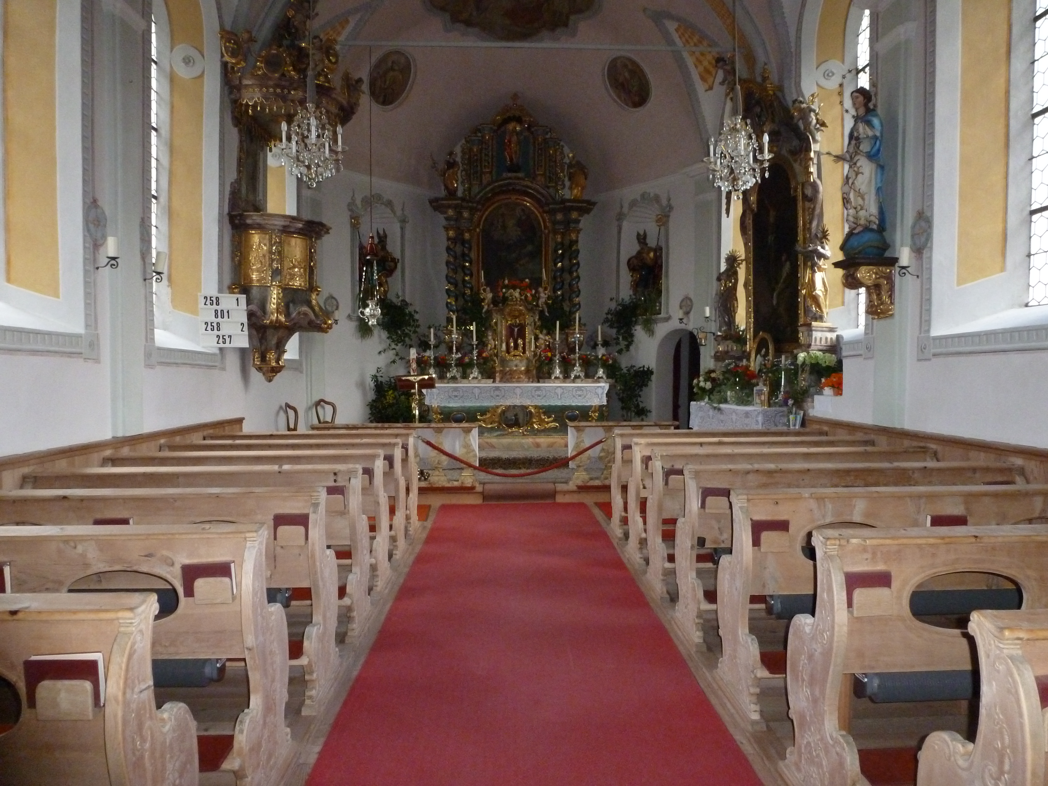 Chapelle de Niederthai, Tyrol.